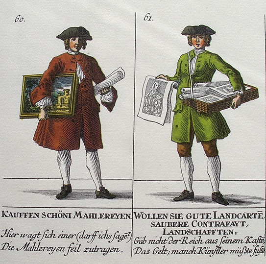 Ausruff-Bilder von David Herrliberger, Nr. 60-61